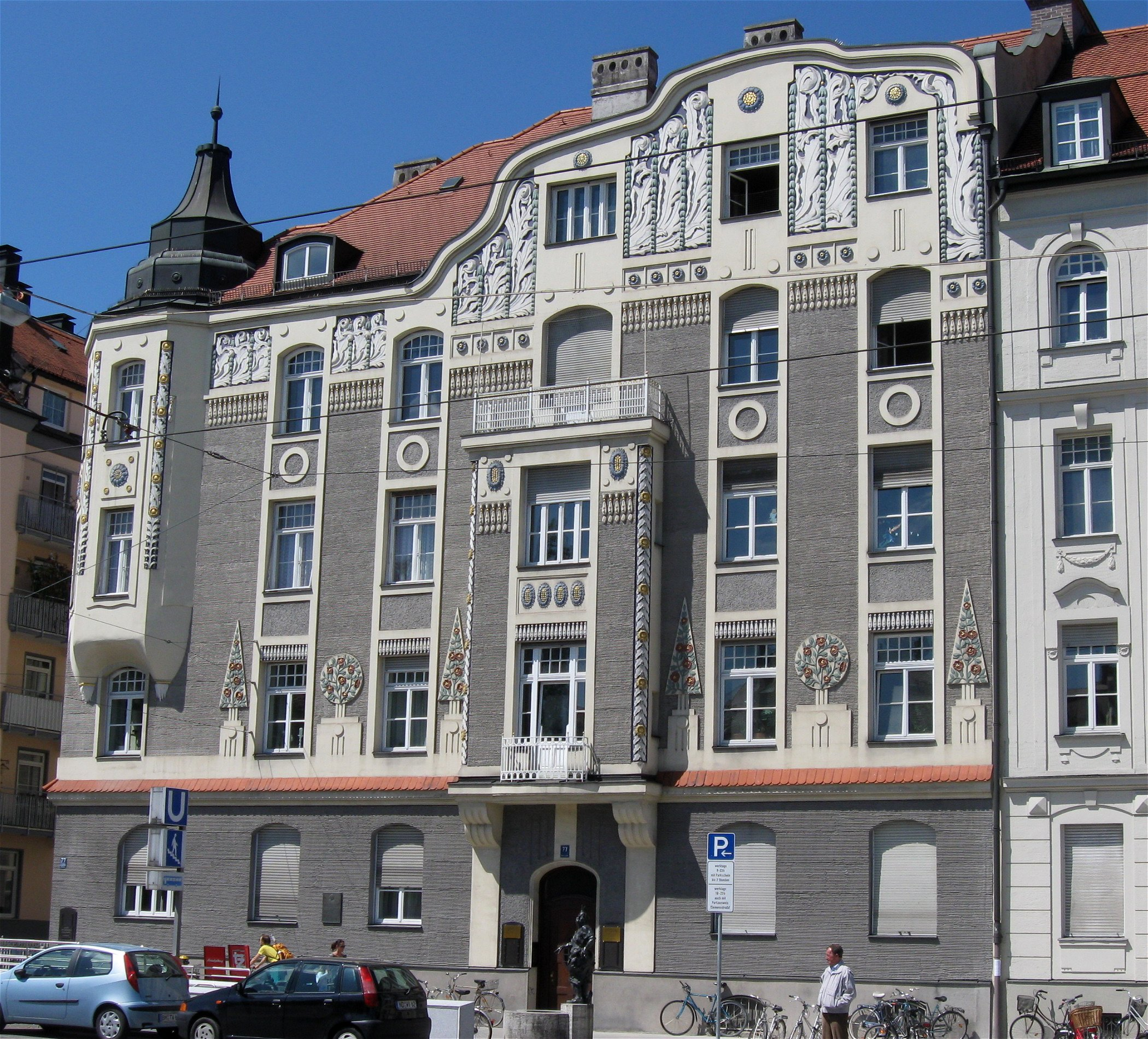 Leopoldstraße 77; Mietshaus, 1900-02 von Martin Dülfer; bis 1906 Wohnhaus des Architekten; Straßenfront vereinfacht